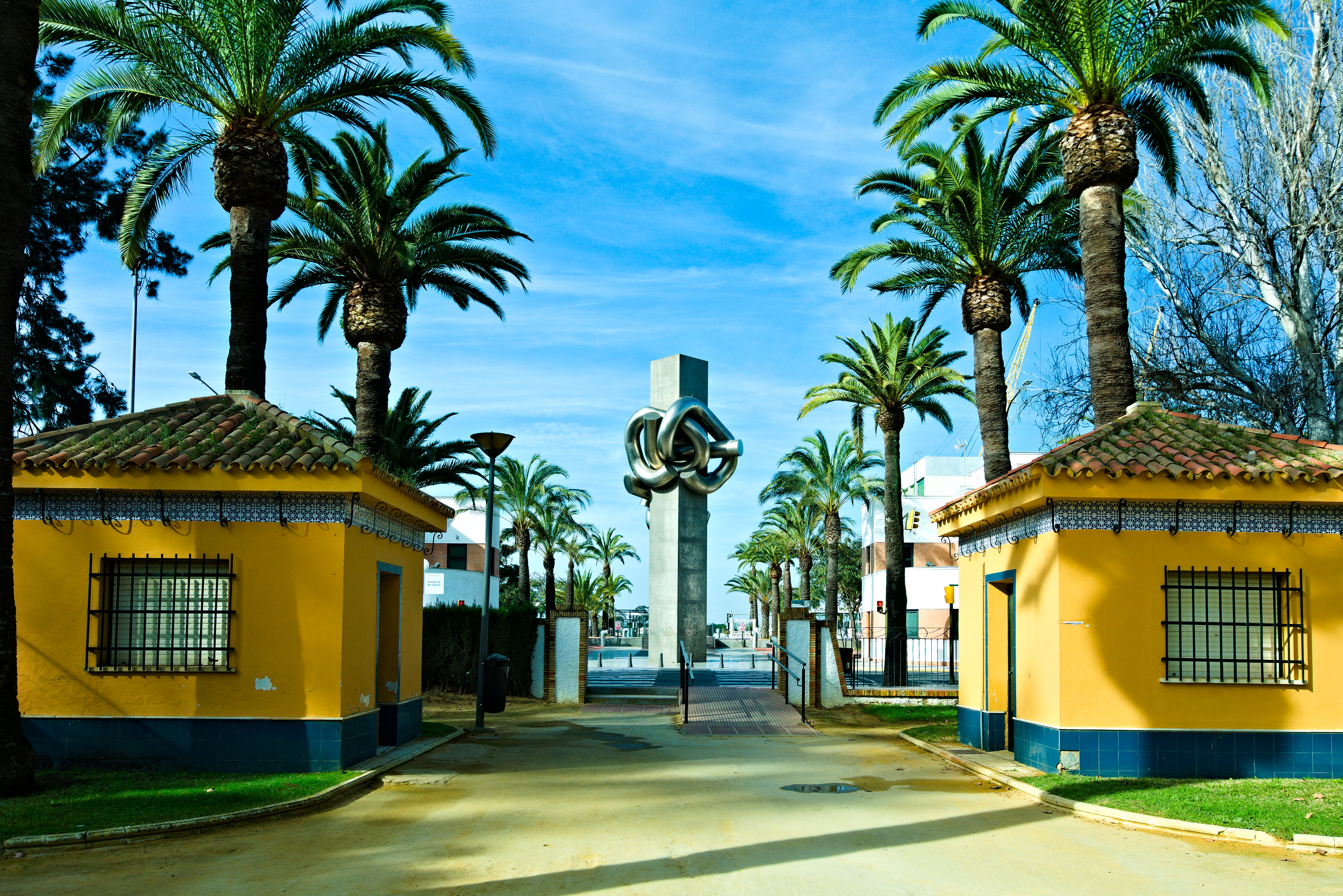 Esta obra se encuentra en el Muelle de las Canoas, en Huelva. Aquí la vemos desde los Jardines del Muelle o Parque de la Palomas.